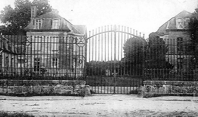 Château d'Hérouville (France) datant du XVIIIe siècle, qui fut un "studio résidentiel" de célèbres artistes internationaux dans les années 1970.